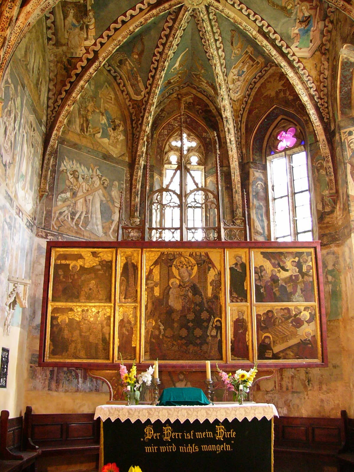 Almakerék templomának apszisa - church of Mălâncrav 01